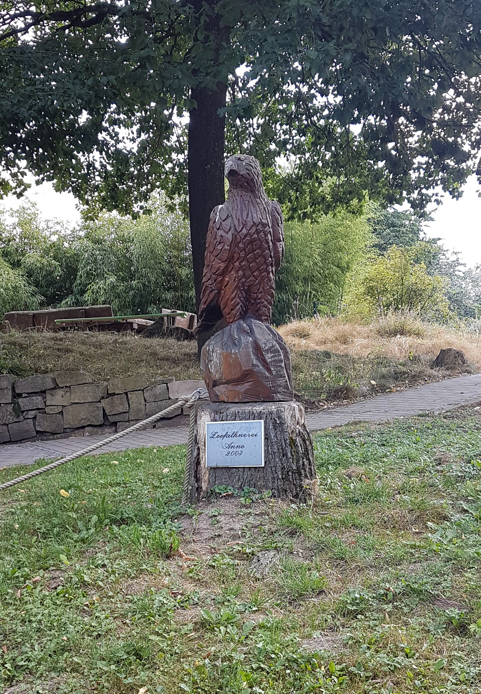 Die Statue eines Falken, aufgestellt vor der Falknerei des Neunkircher Zoos